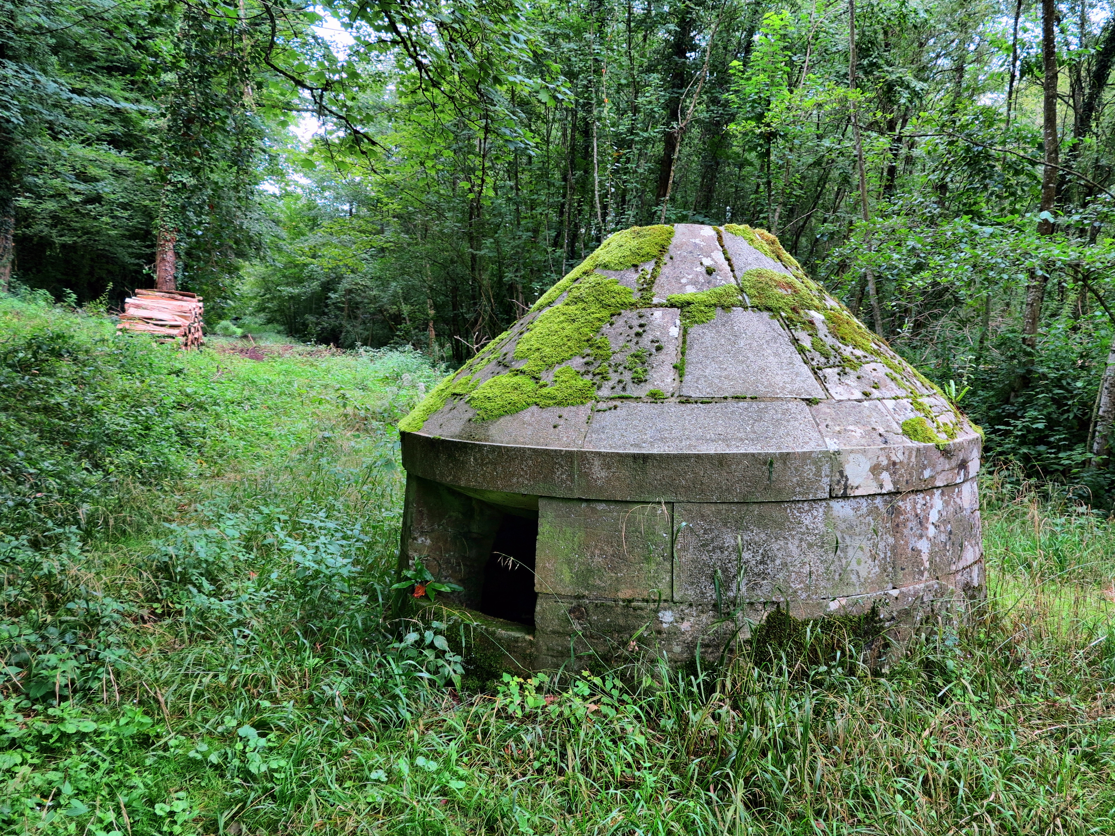 La fontaine de Rosemont